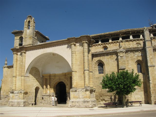 Iglesia de San Pedro (Frómista, Palencia)